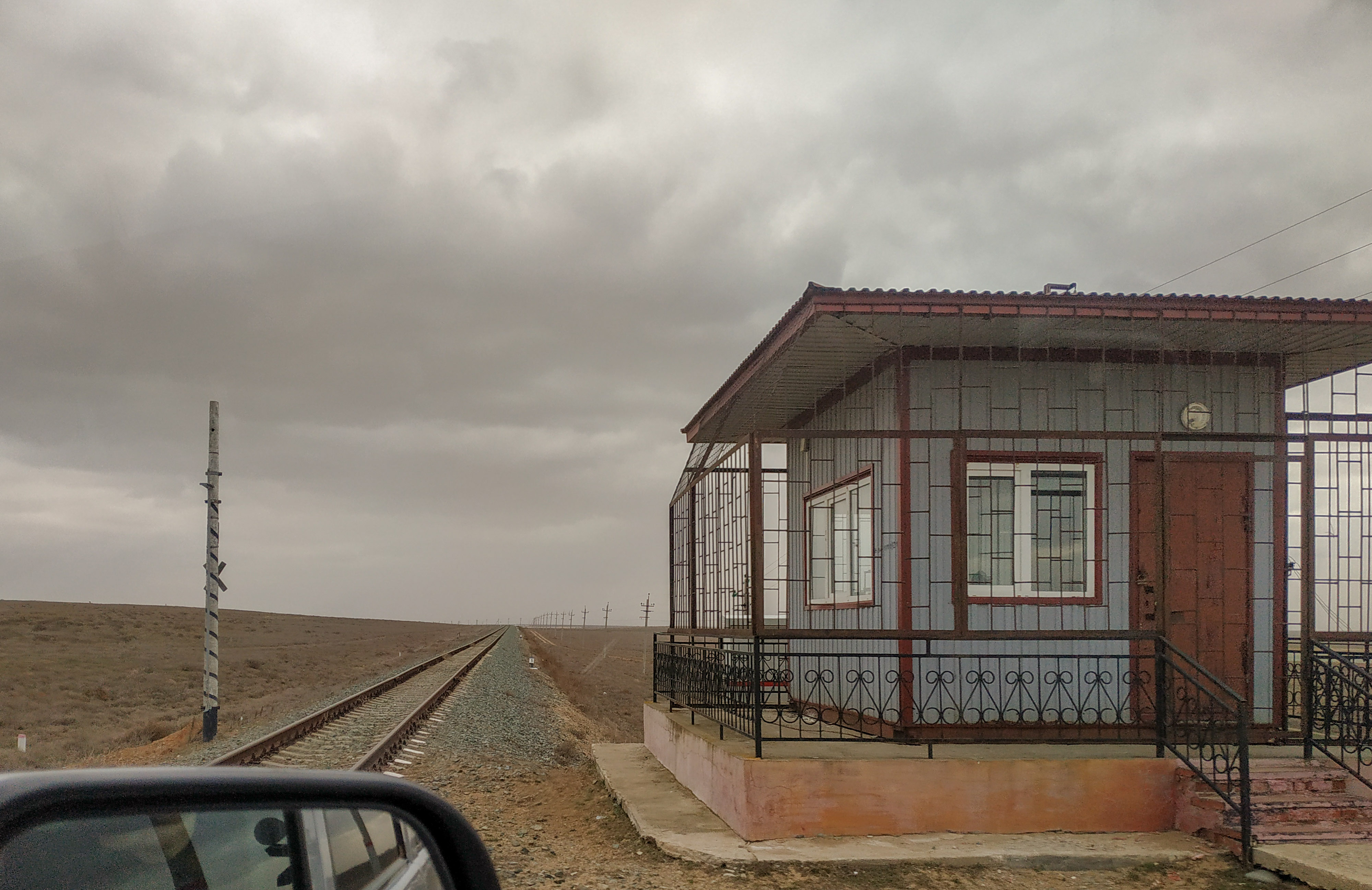 РЖД железная дорога Яндыки - Порт Оля. У Лимана.